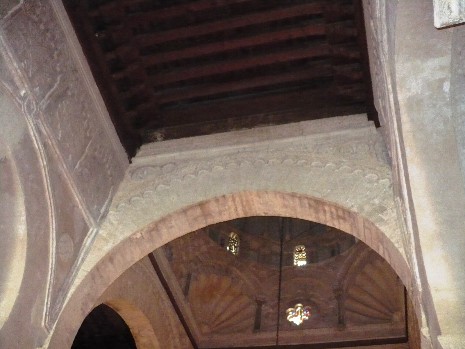 Vue d'une portion du plafond à solives de la nef centrale de la salle de prière de la Grande Mosquée de Kairouan, en Tunisie.